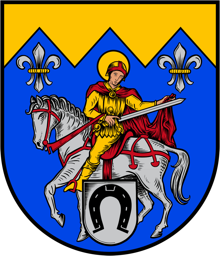 Das Gerichtssiegel des 18. Jahrhunderts zeigt als Symbol für den heiligem Martin nur ein einfaches Hufeisen mit abwärsgekehrten Stollen. Die Gemeinde führte dieses Siegel als Wappen weiter und betrachtete es irrtümlich als genehmigt. So wurde es auch von Hupp abgebildet. Zur Unterscheidung von den vielen pfälzischen Gemeinden mit einfachen Hufeisenwappen wurde der dem Ort seinen Namen gebende heilige Martin zu Ross und seinen Mantel teilend hinzugefügt. Schildhaupt und Lilien sind dem Wappen der Kämmerer von Dalberg entnommen, die als Lehnsträger des Bischofs von Speyer Herren der Kropsburg über St. Martin waren.